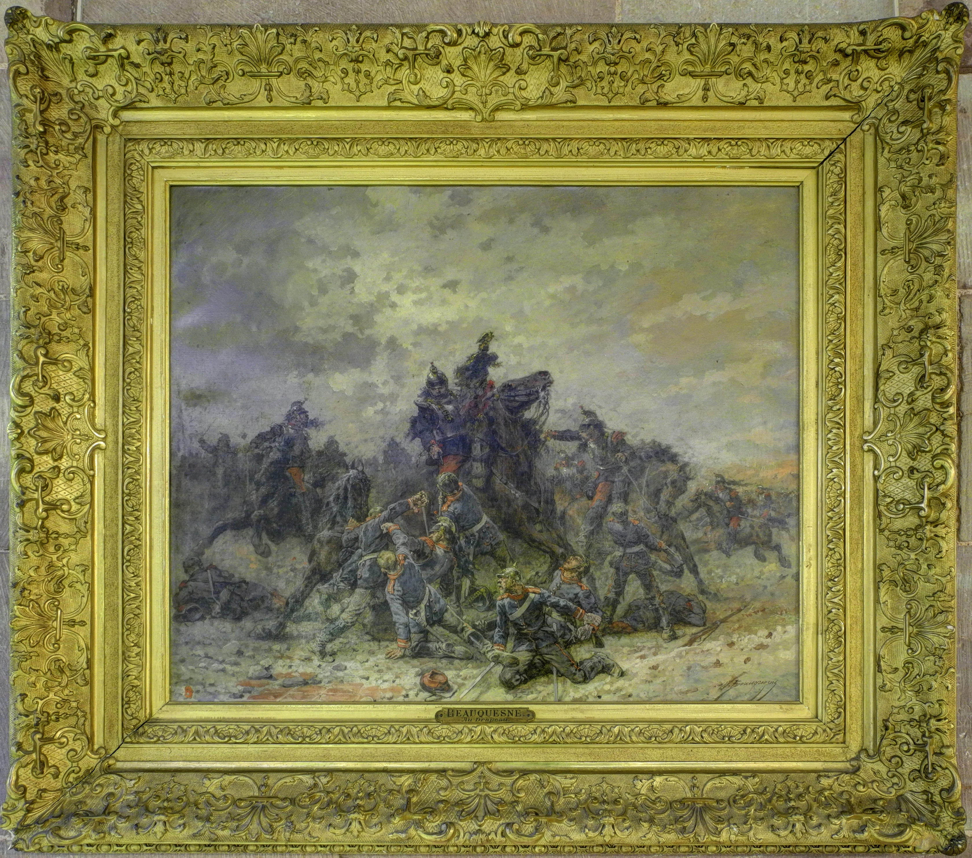 Musée d'Histoire : Au drapeau (HDR). Wilfrid Constant Beauquesne (Rennes, 1847 - Montgeron, 1913). Peinture représentant une charge de cavalerie française (guerre franco-allemande de 1870-1871) Début XXe siècle peinture à l'huile sur toile Achat N° inv : A. 16